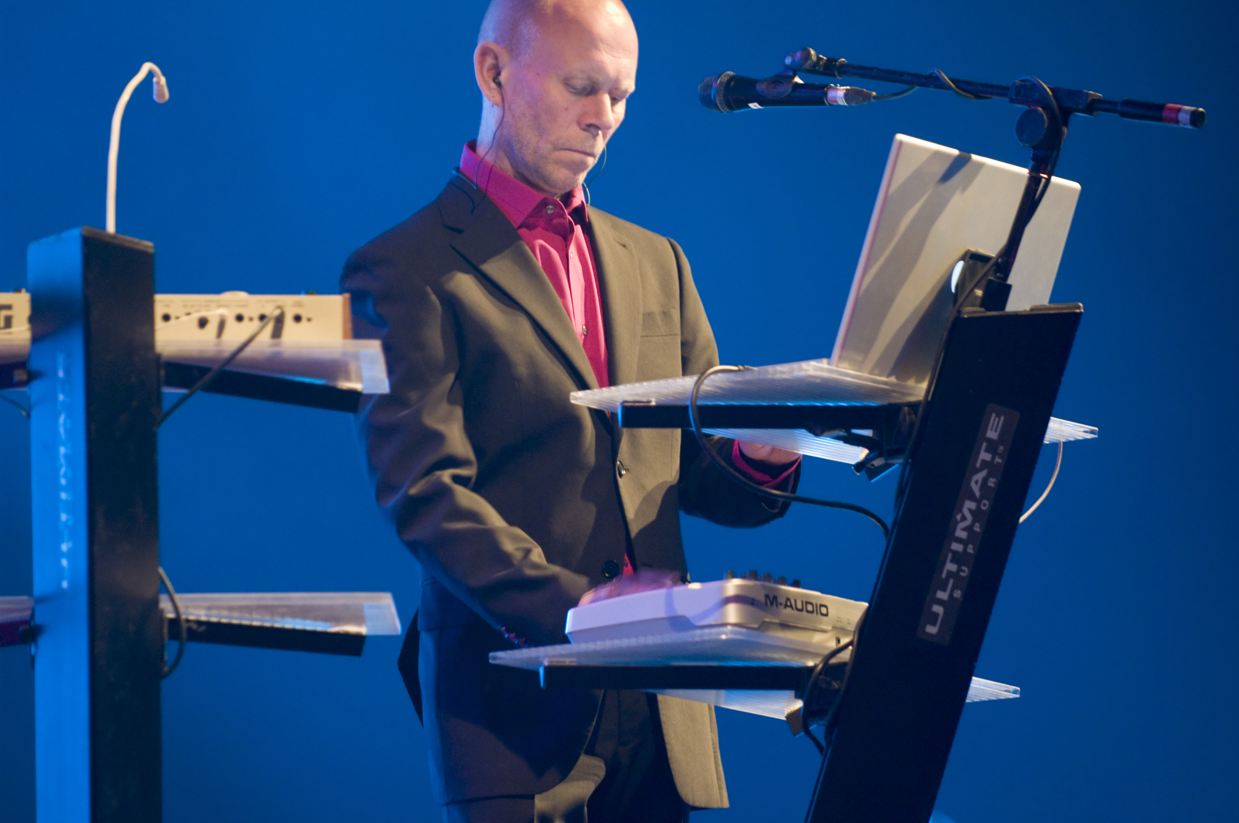 Yazoo (band), Vince Clarke.